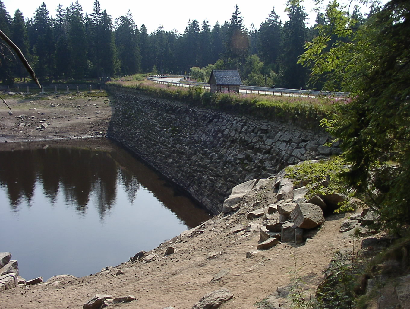 Blick auf die wasserseitige Staumauer des Oderteiches von Nordwesten bei niedrigen Teichwasserstand